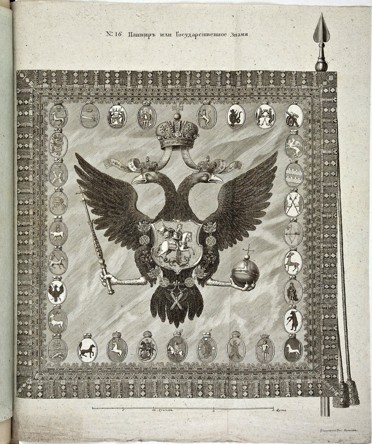 Паннир или государственное знамя (из кн.: Обстоятельное описание торжественных порядков... священнейшаго коронования ея августейшаго императорскаго величества... государыни императрицы Елисавет Петровны. СПб., 1744). Президентская библиотека